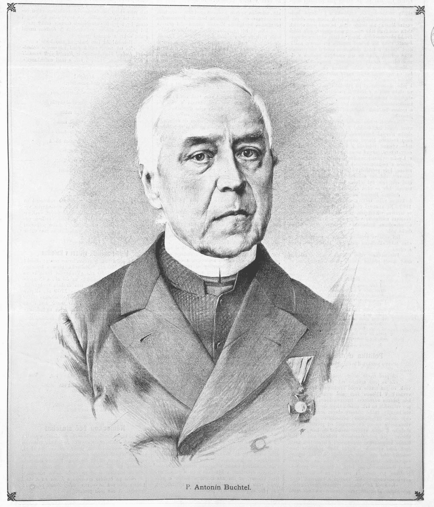 Portrét hudebního skladatele Antonína Buchtela